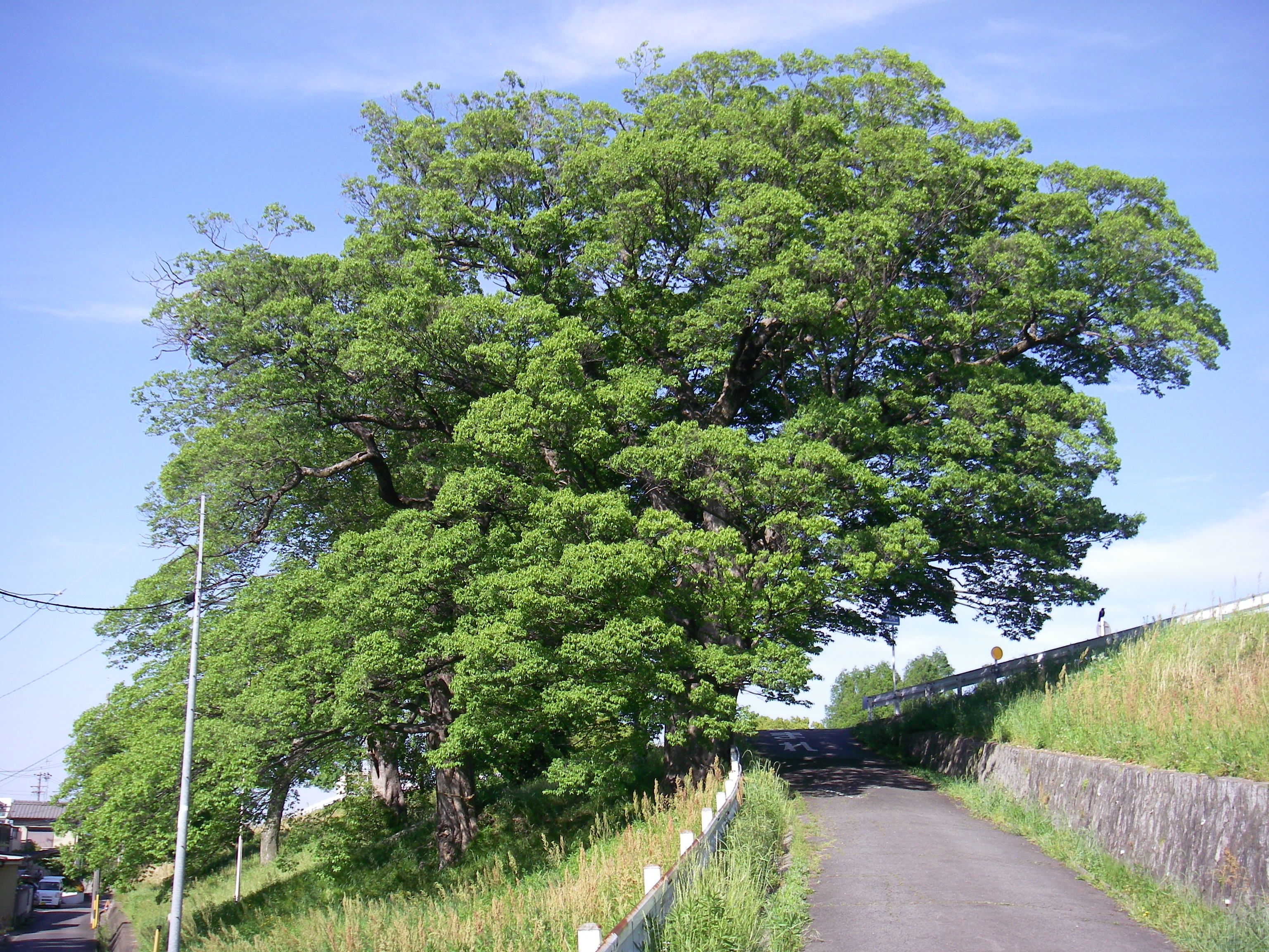 星神社（名古屋市西区）のムクノキ。 名古屋市都市景観重要建築物等（保存樹）に指定されている。